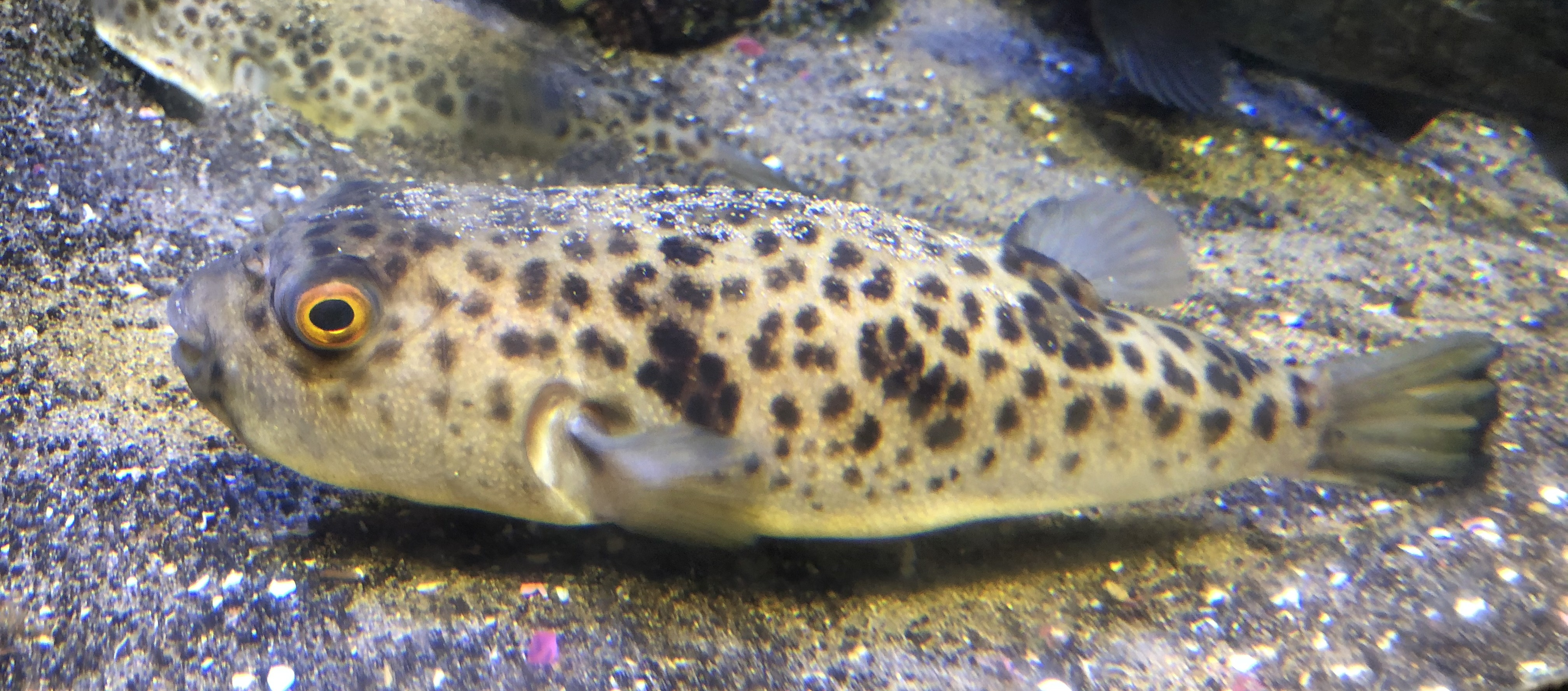 ヒガンフグ。島根県立しまね海洋館飼育個体。